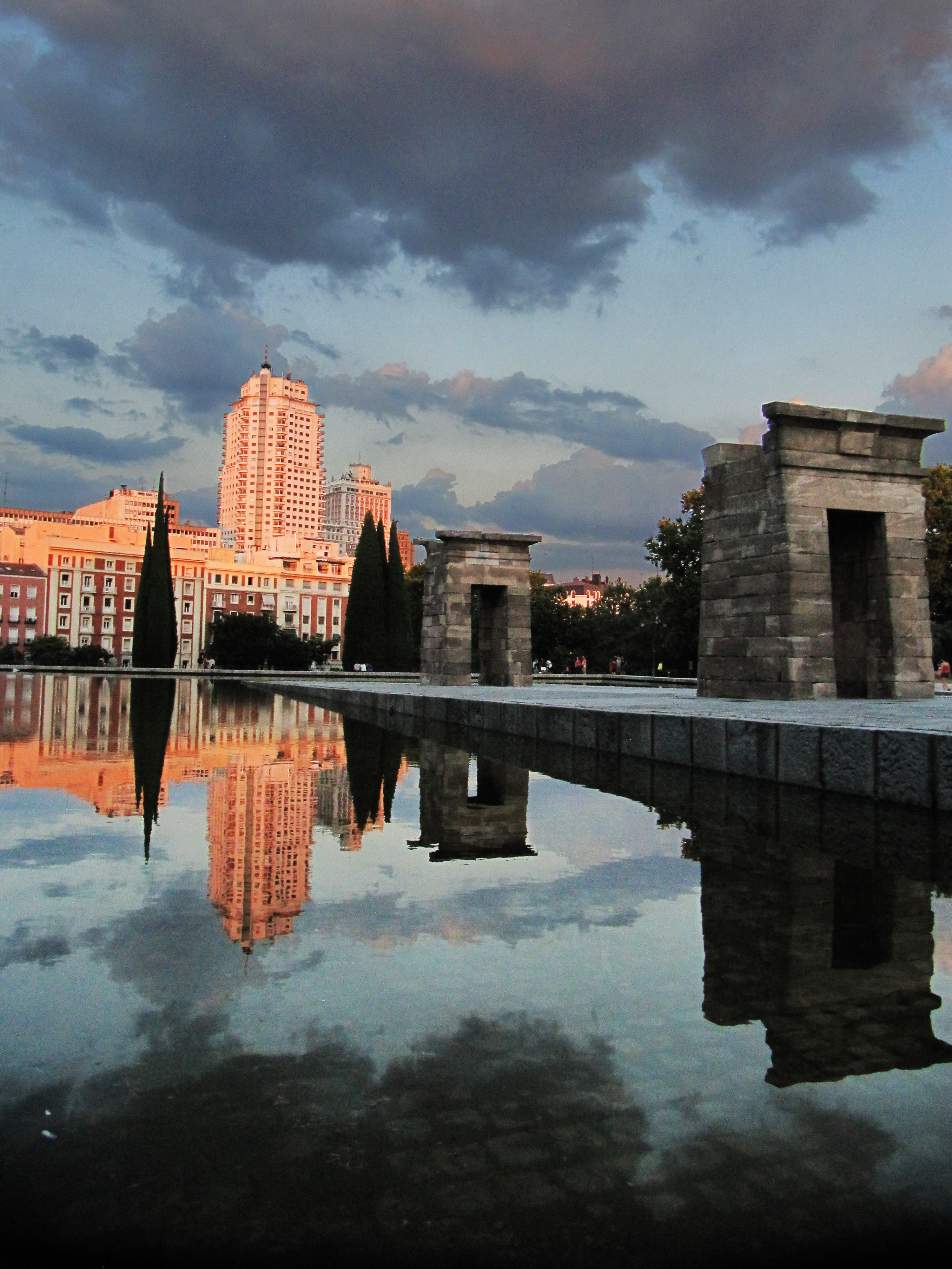 A spanyol főváros, Madrid egyik parkjában látható ez az ókori egyiptomi templom. Egyiptom 1968-ban ajándékozta a spanyol államnak, cserébe a núbiai templomok megmentésében való részvételért. Kb. 2200 éves, és az új helyszínen való felállításánál is ügyeltek arra, hogy megőrizze eredeti orientációját.